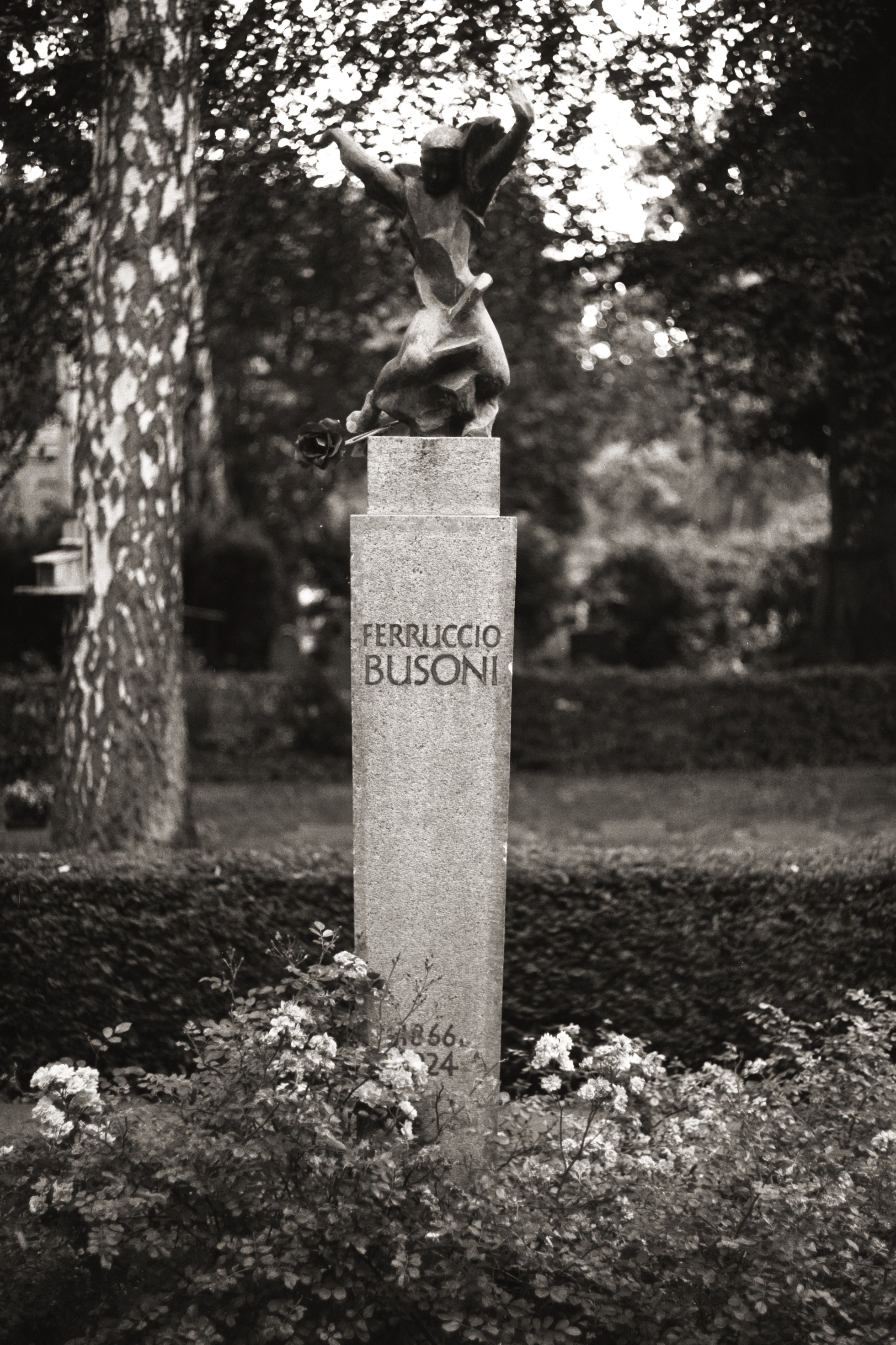 Grabmal auf dem Friedhof Friedenau